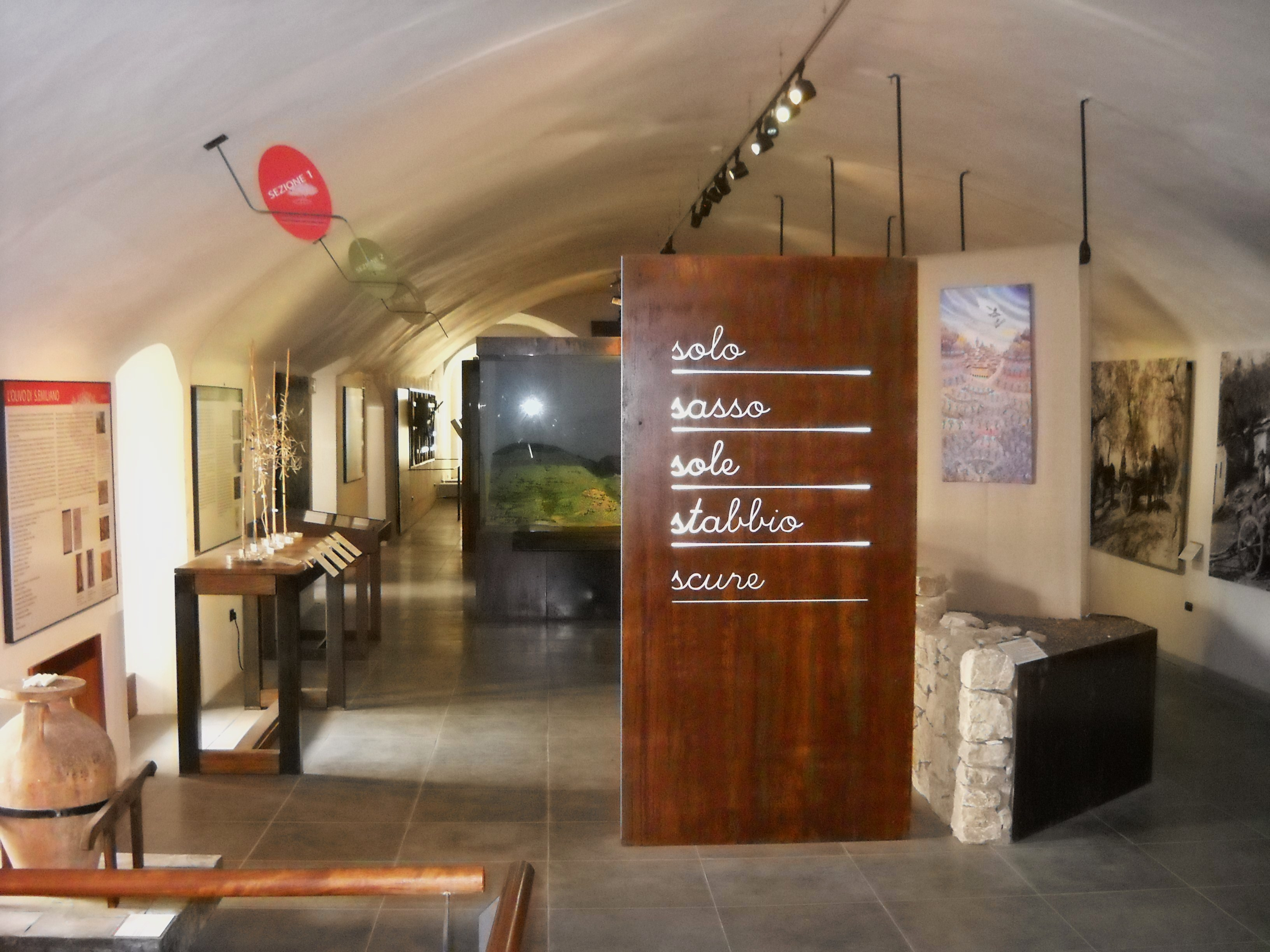 Trevi̠ Museo della Civiltà dell'Ulivo (Complesso museale San Francesco)